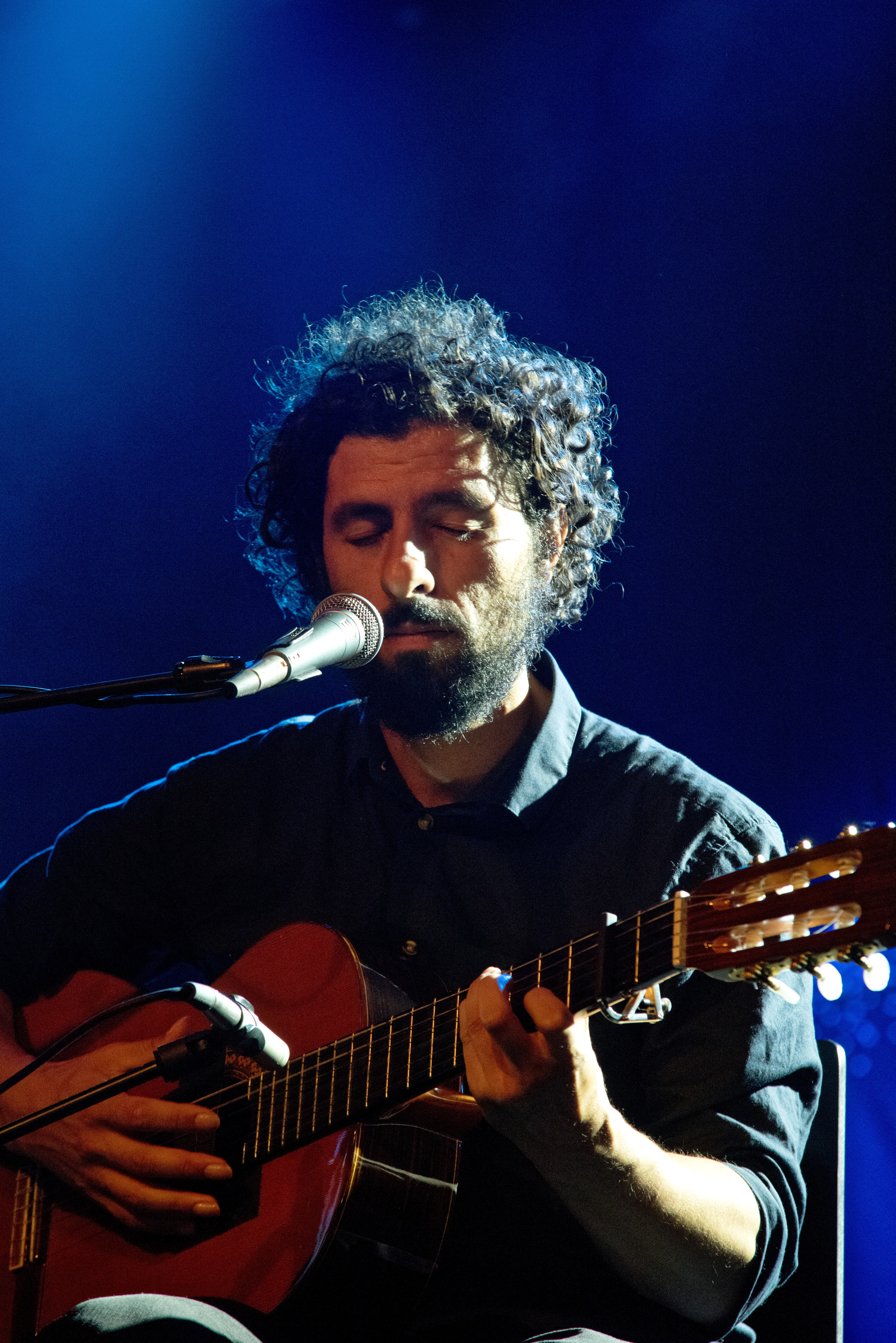 Bilder vom Zelt Musik Festival 2017 in Freiburg im Breisgau José González am 13.07.2017